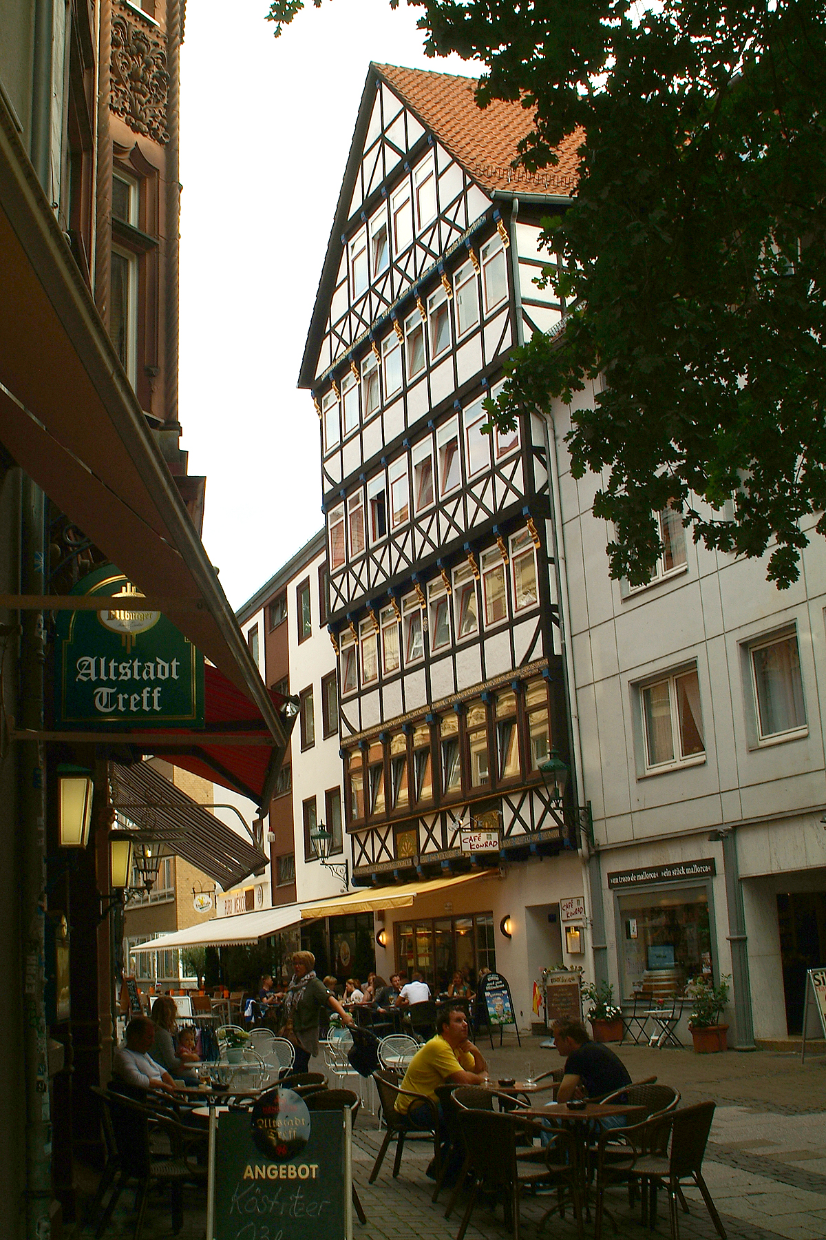 Blick durch die Knochenhauerstraße auf das Fachwerkgebäude Nummr 34 mit dem Restaurant und Café Konrad im Erd- und ersten Obergeschoss ...